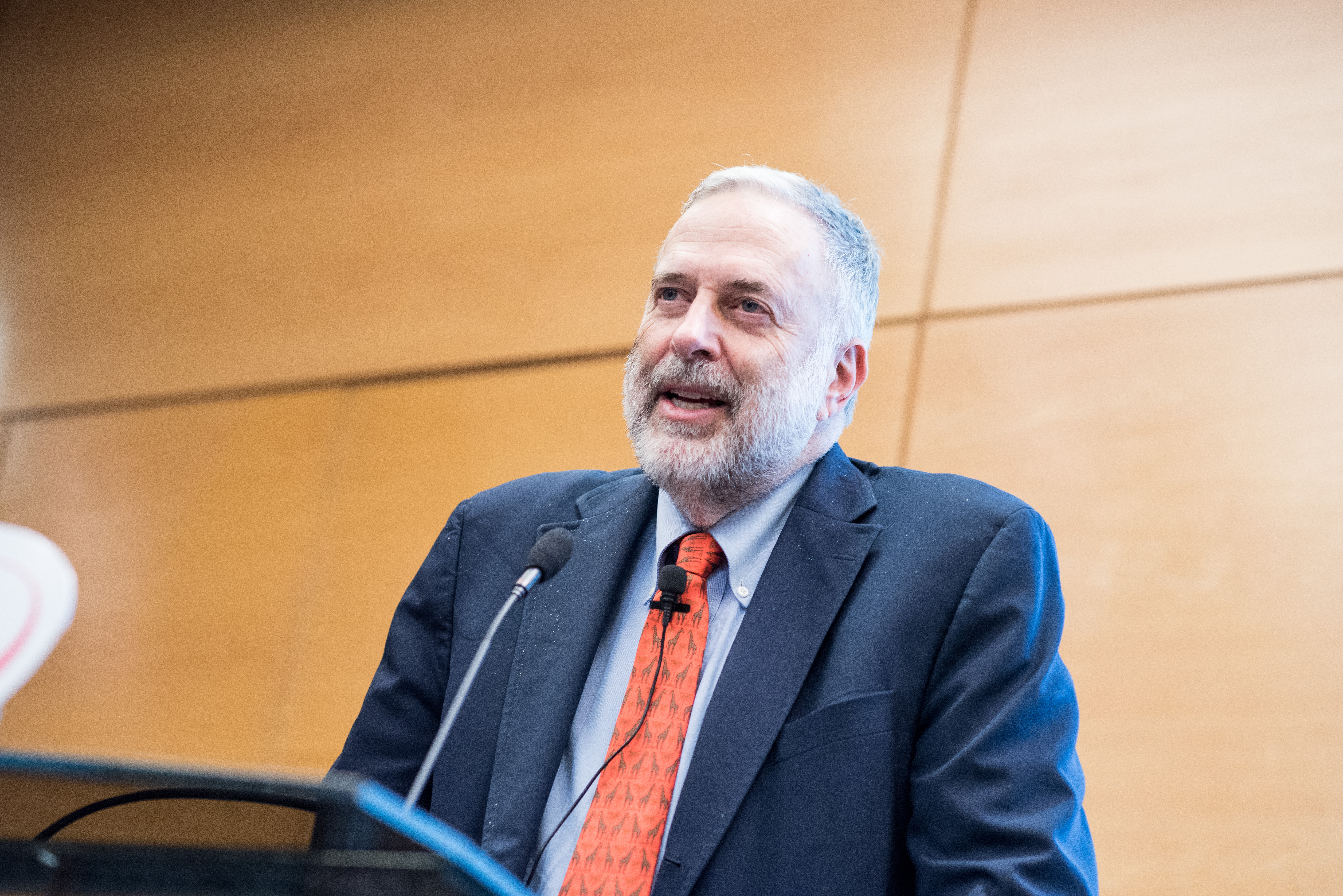 Foto de James S. Fishkin en la primera edición de la conferencia Democracia 2050, organizada por la Fundación Tribu en Santiago de Chile, el 15 de enero de 2018.